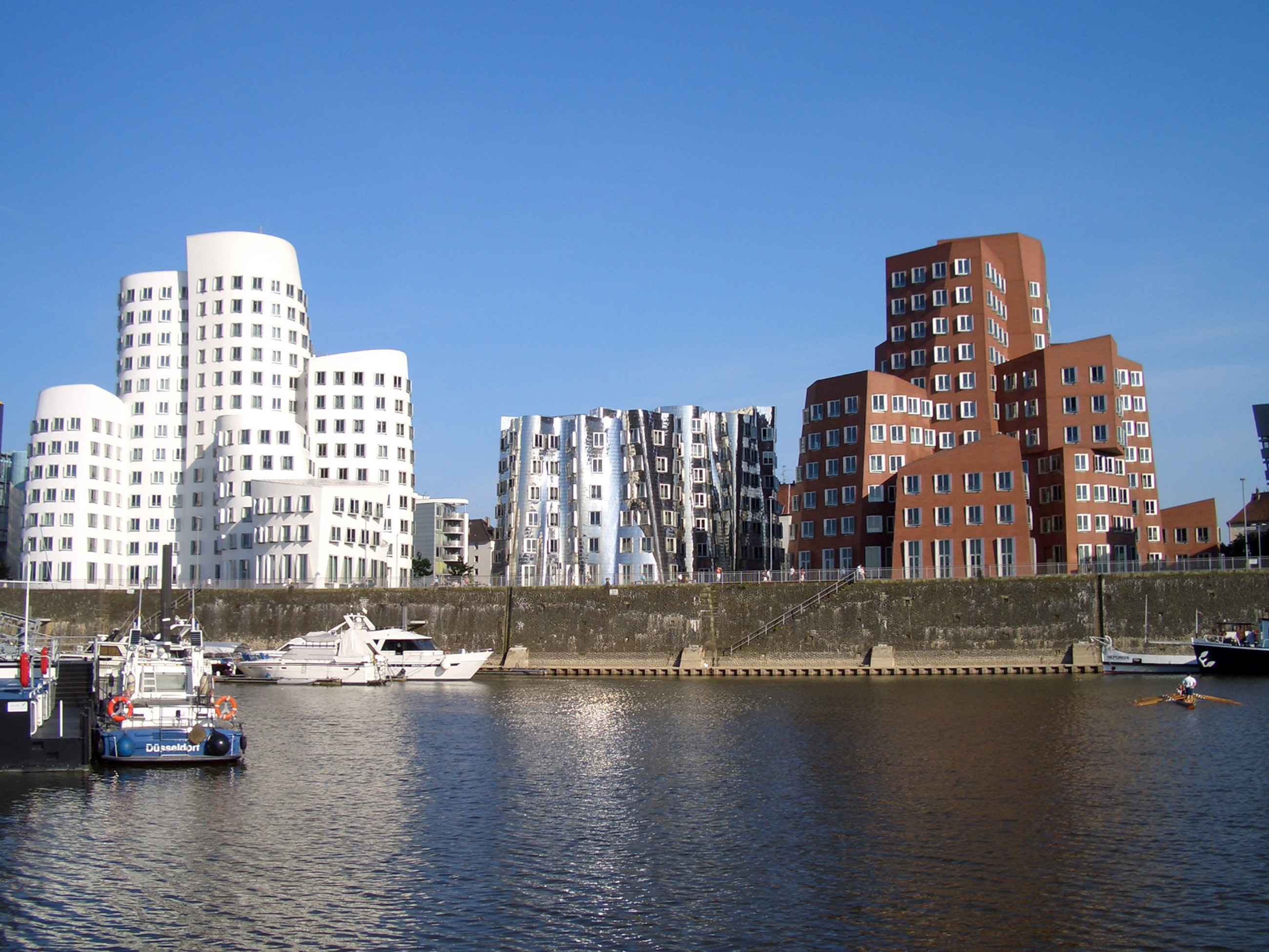 Северный Рейн - Вестфалия, Дюссельдорф - Комплекс зданий "Новая таможня" в Рейнской гавани